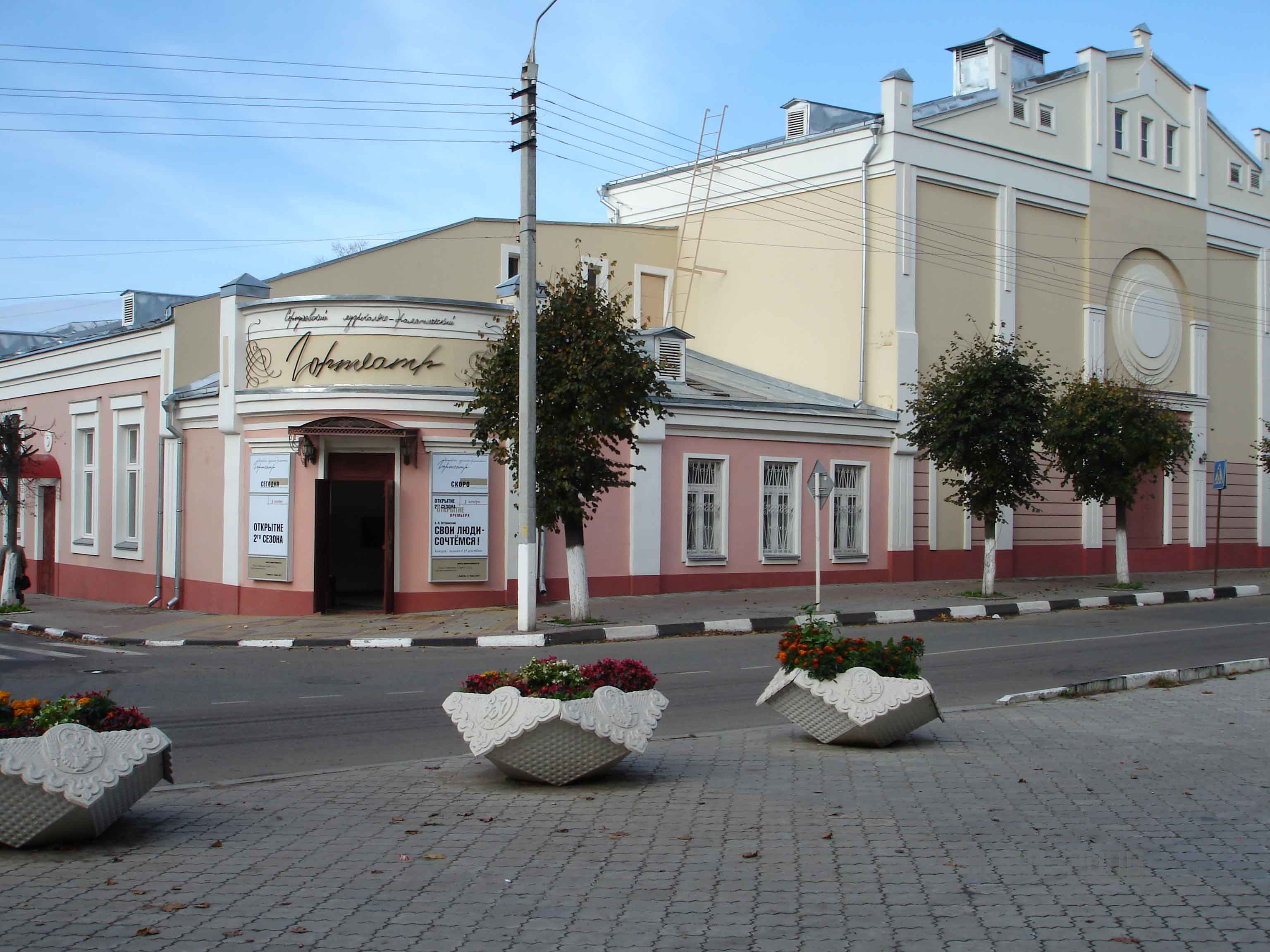 Серпуховский городской музыкально-драматический театр